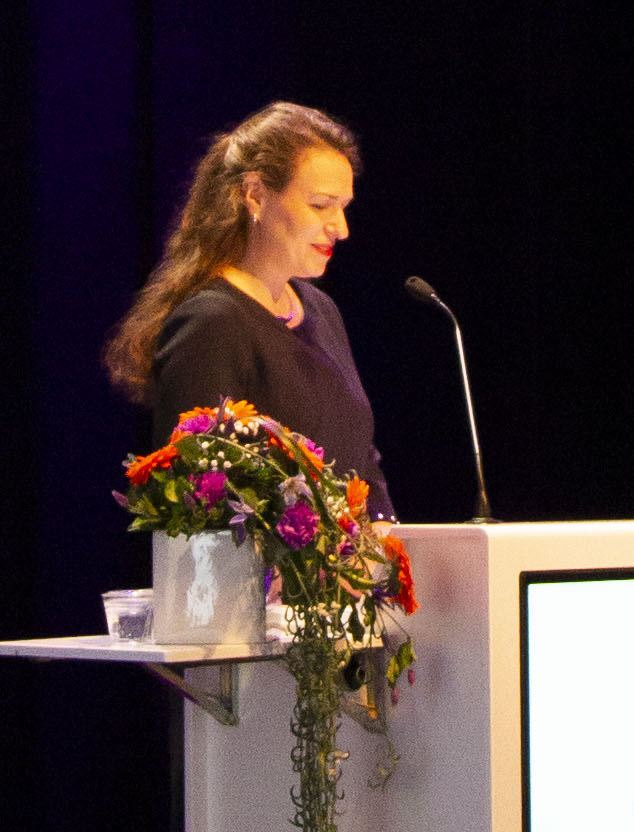 © Hanna Leppänen | Tampereen kaupunki